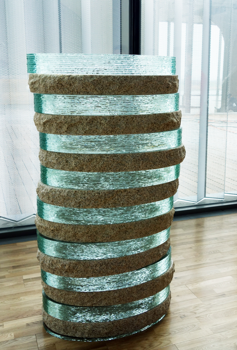 CONTINUOUS 2012 Collectie Long Museum West Bund - Shanghai - China